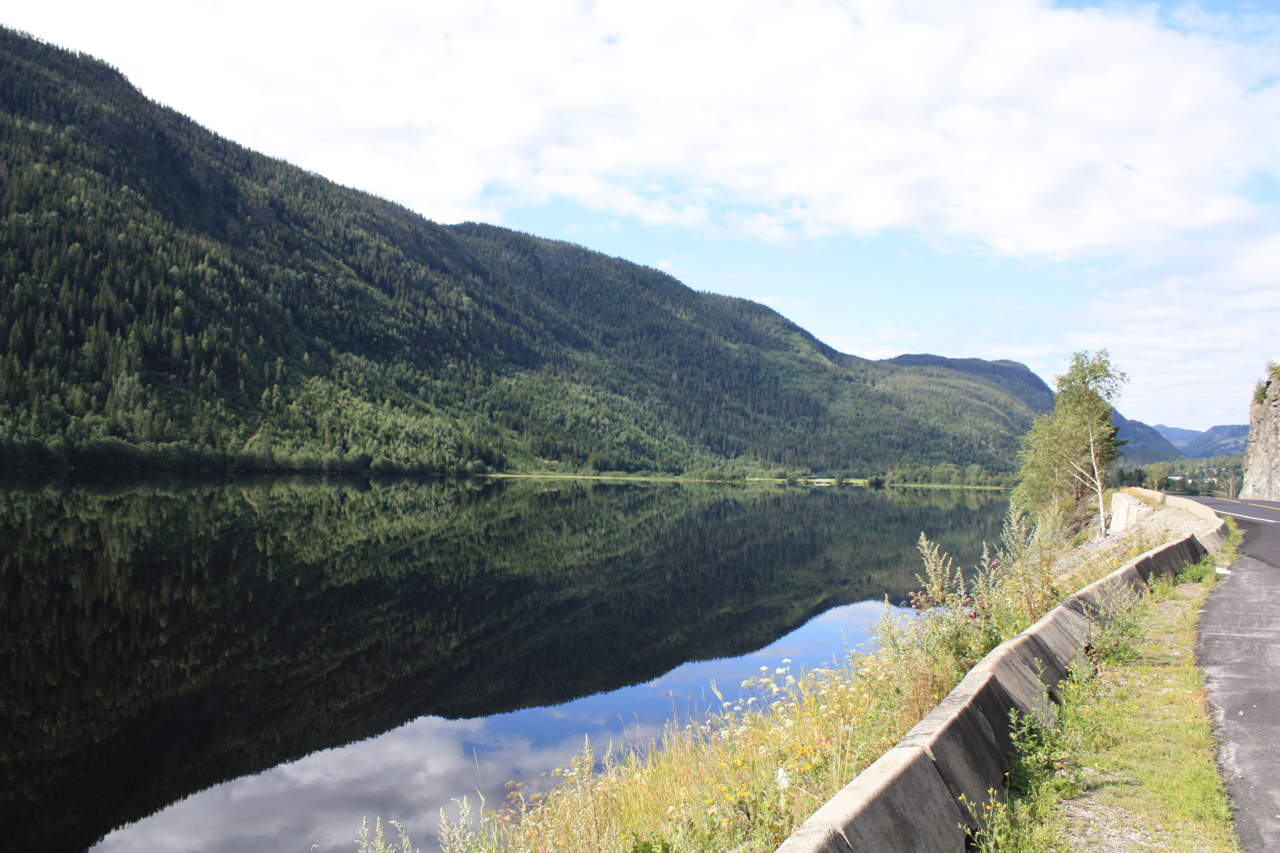 Hjartsjåvatnet i Hjartdal i Telemark, sett mot øst.